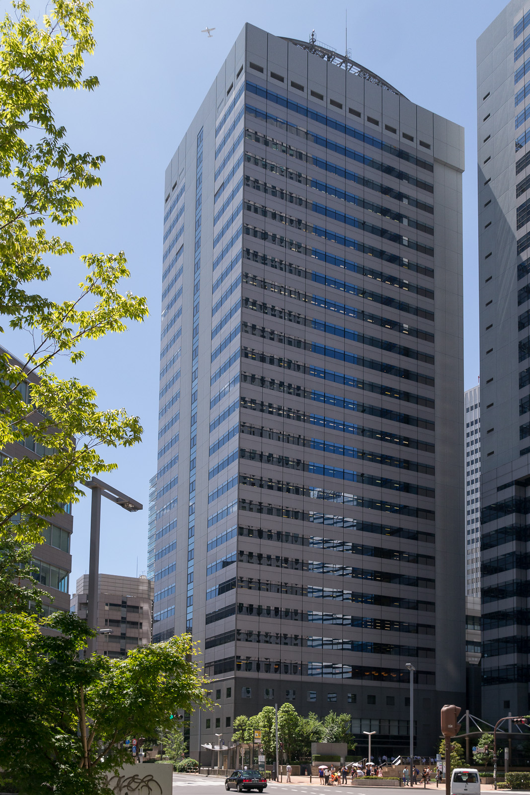 エステック情報ビル、東京都新宿区西新宿。